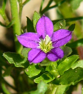 Frauenspiegel Kleinblütiger Blüte